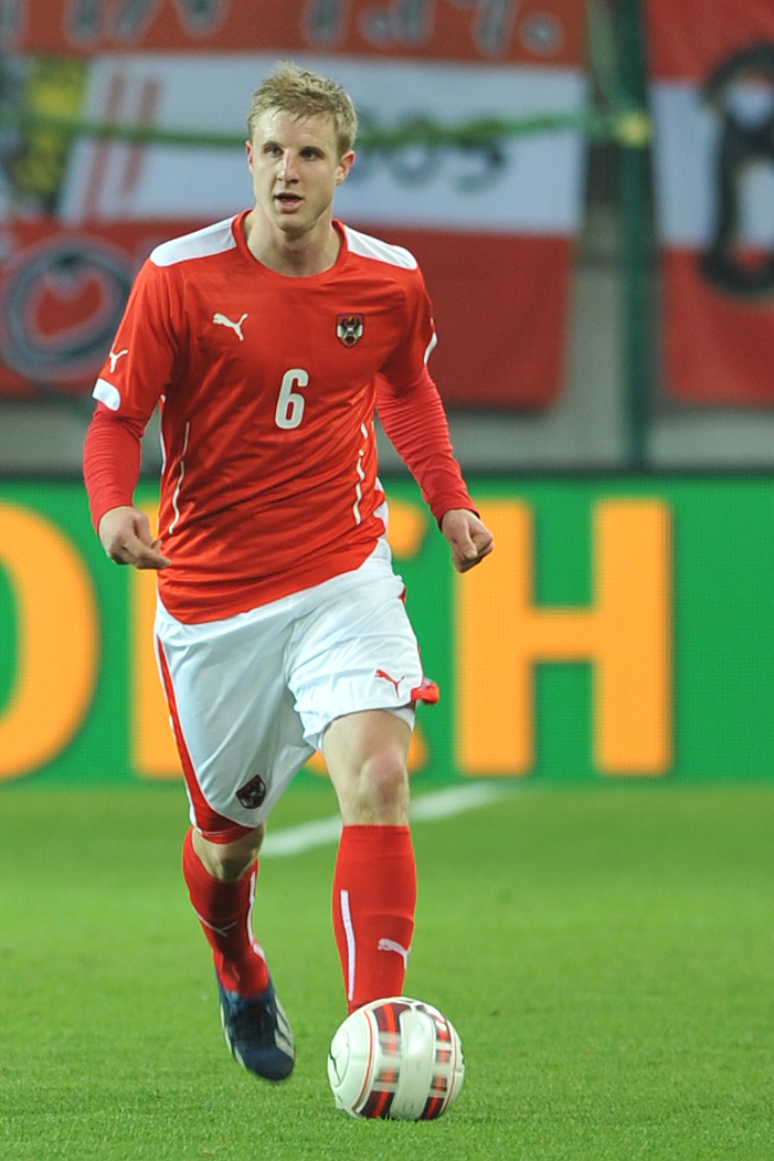 Freundschaftliches Länderspiel Österreich - Uruguay am 5. März 2014 in Klagenfurt: Martin Hinteregger